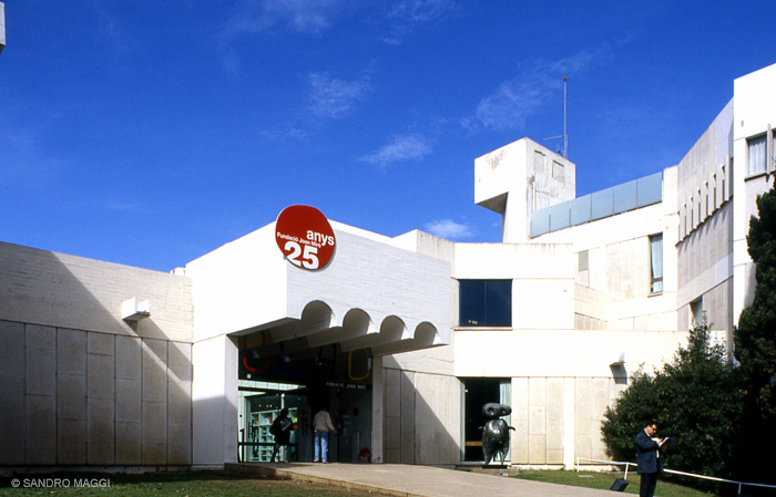 Fundació Miró (Barcelona), amb la decoració del 25è aniversari